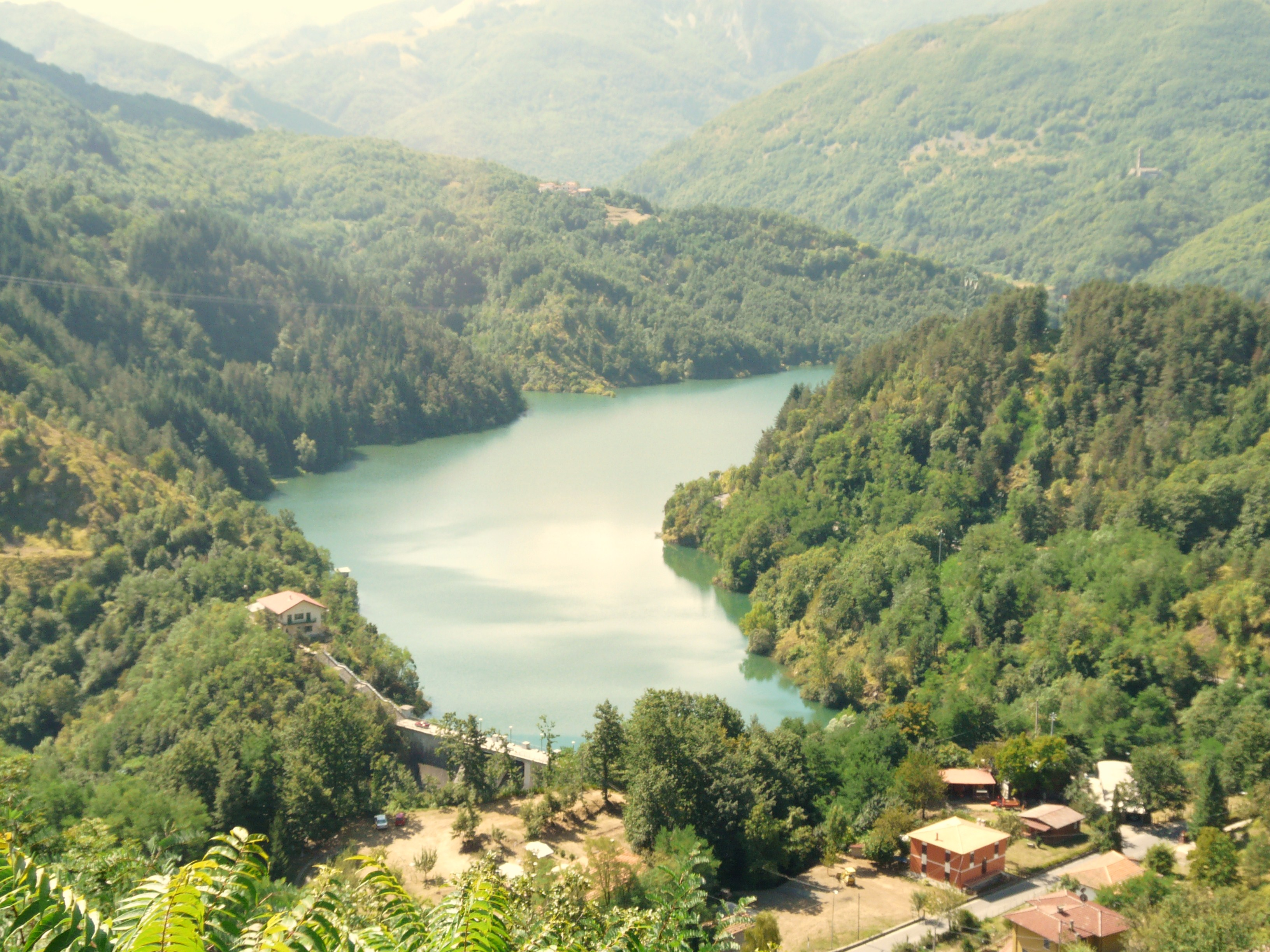 Vista del lago di Gramolazzo dalla frazione di Castagnola, Minucciano, Toscana, Italia